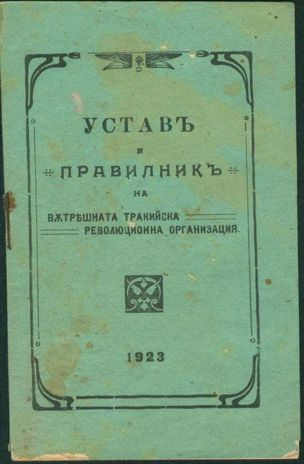 Устав и правилник на Вътрешната тракийска революционна организация, дело на Тане Николов.